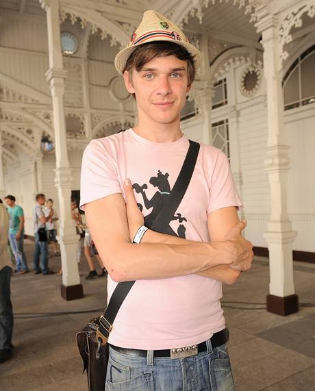 Vojtěch Dyk na MFF Karlovy Vary 2009